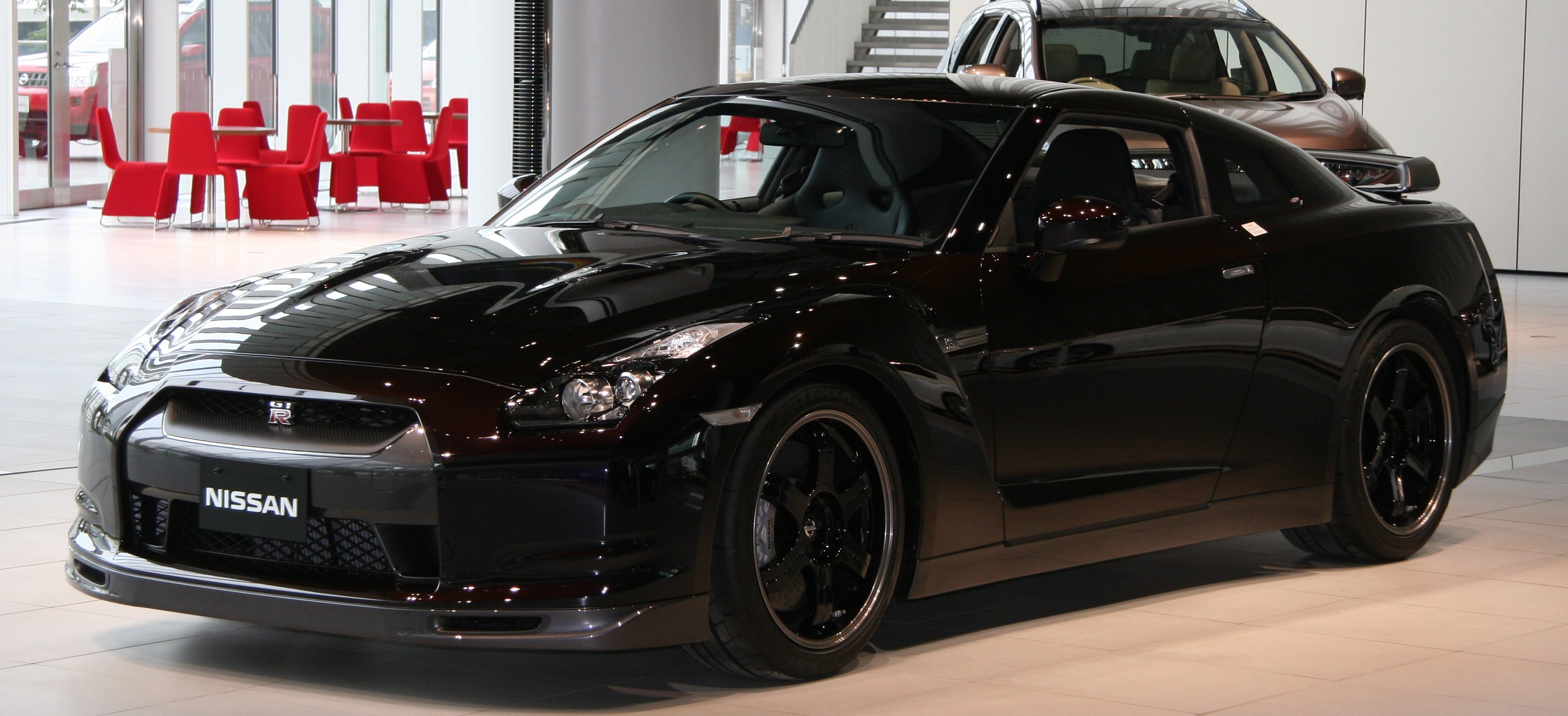 NISSAN GT-R